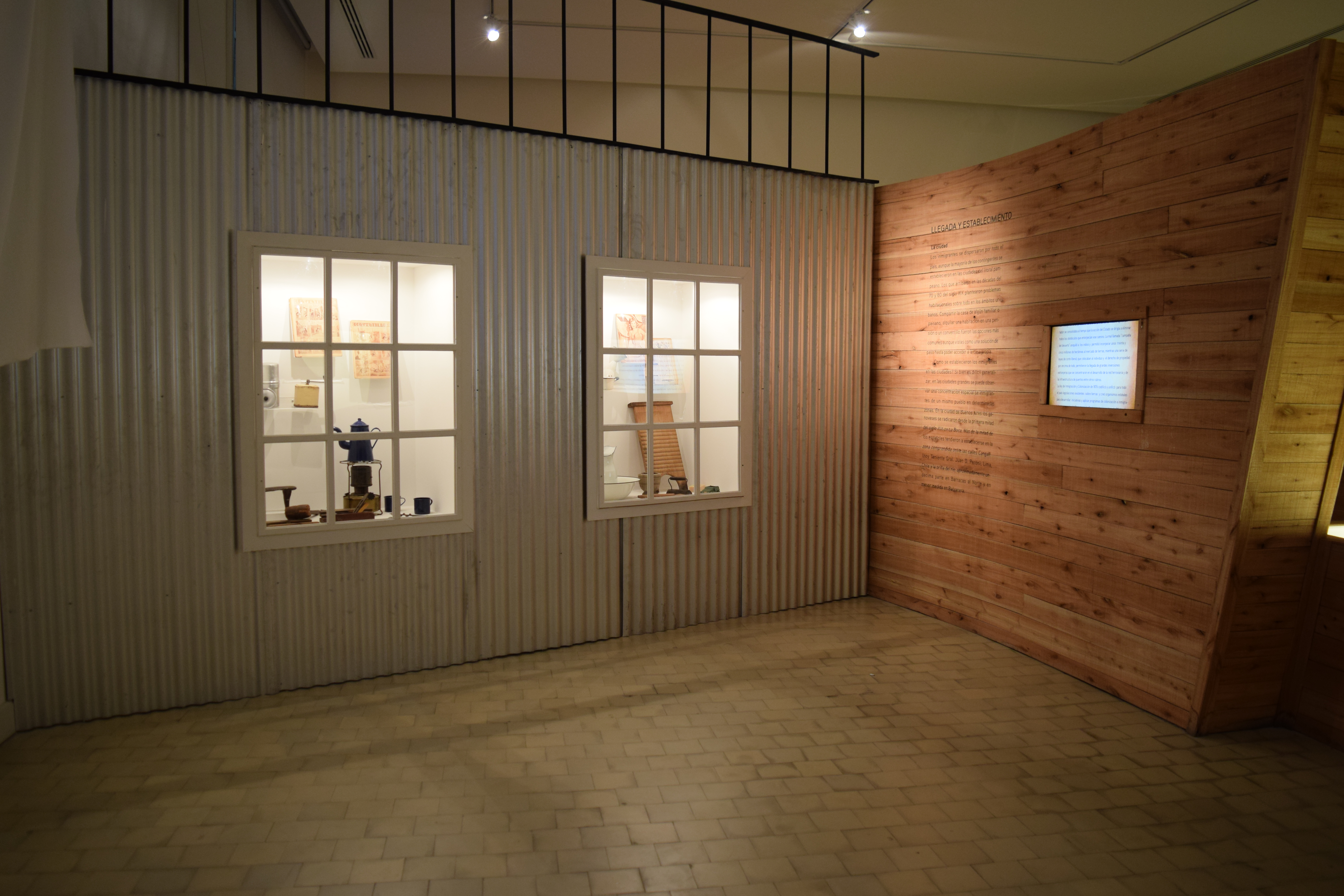 Editatón en el Hotel del Inmigrante, organizado por Wikimedia Argentina y MUNTREF.